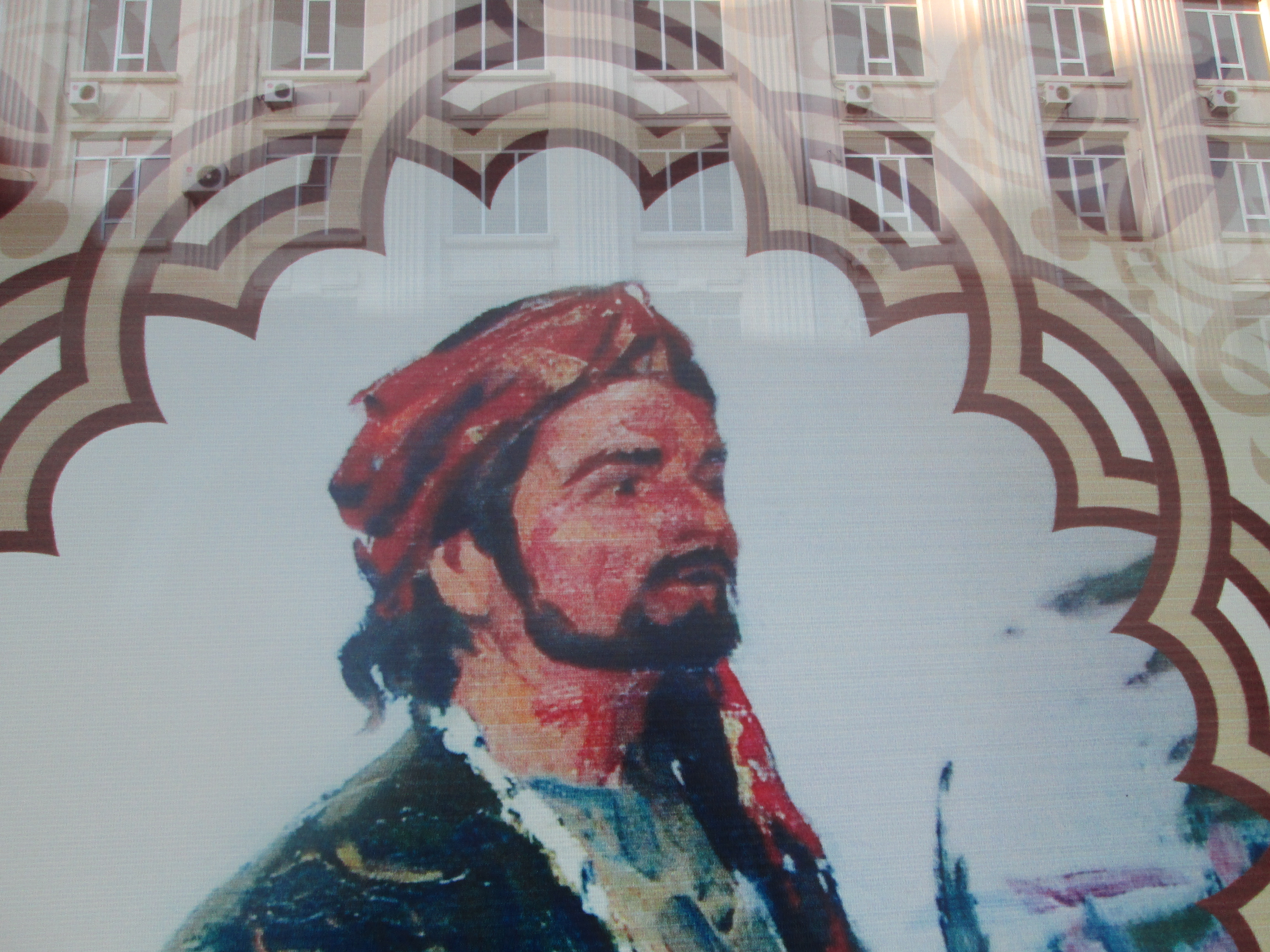 Nizami adına Ədəbiyyat Muzeyinin binasının pəncərəsində Bəhmənyar əl-Azərbaycani rəsmi